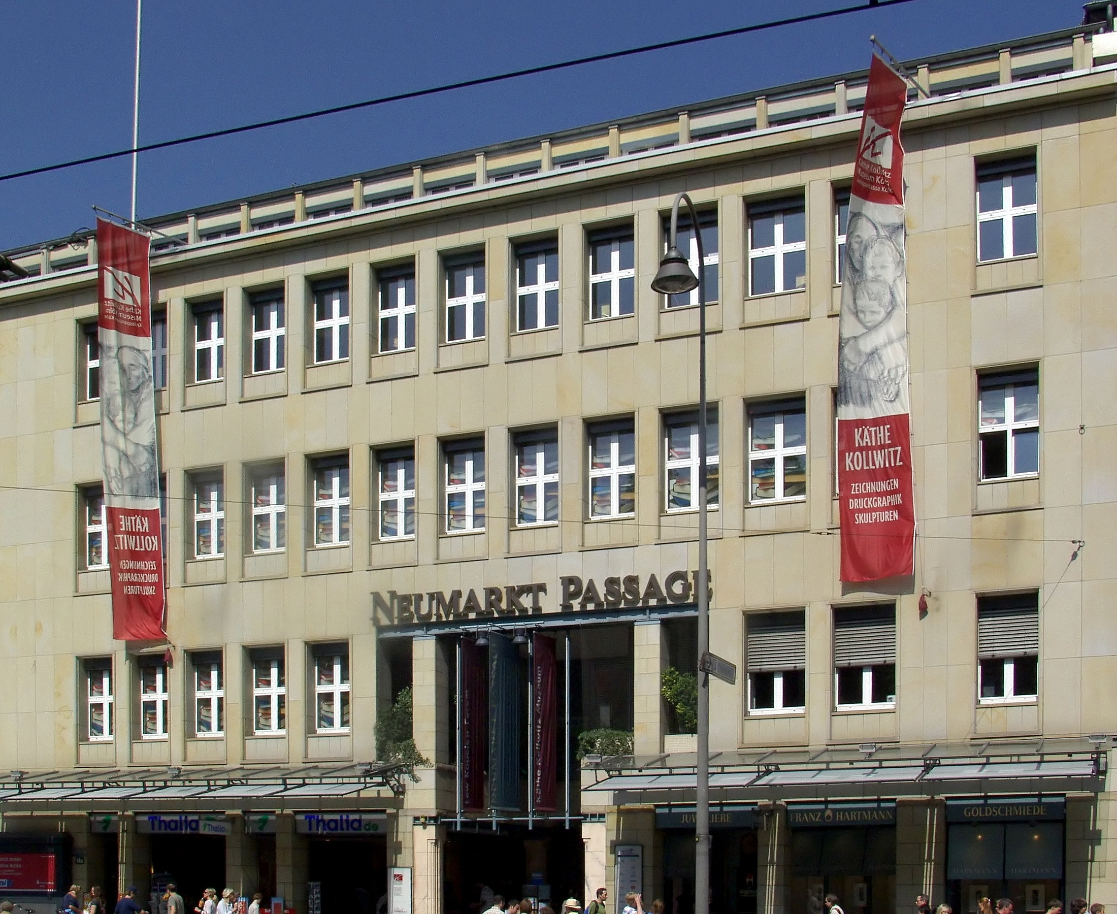 Gebäude der Kreissparkasse Köln am Neumarkt in Köln. Architekt: Walter Dietz, errichtet: 1948-53 Eingang in die dahinter liegende Neumarkt-Passage mit dem Käthe-Kollwitz-Museum